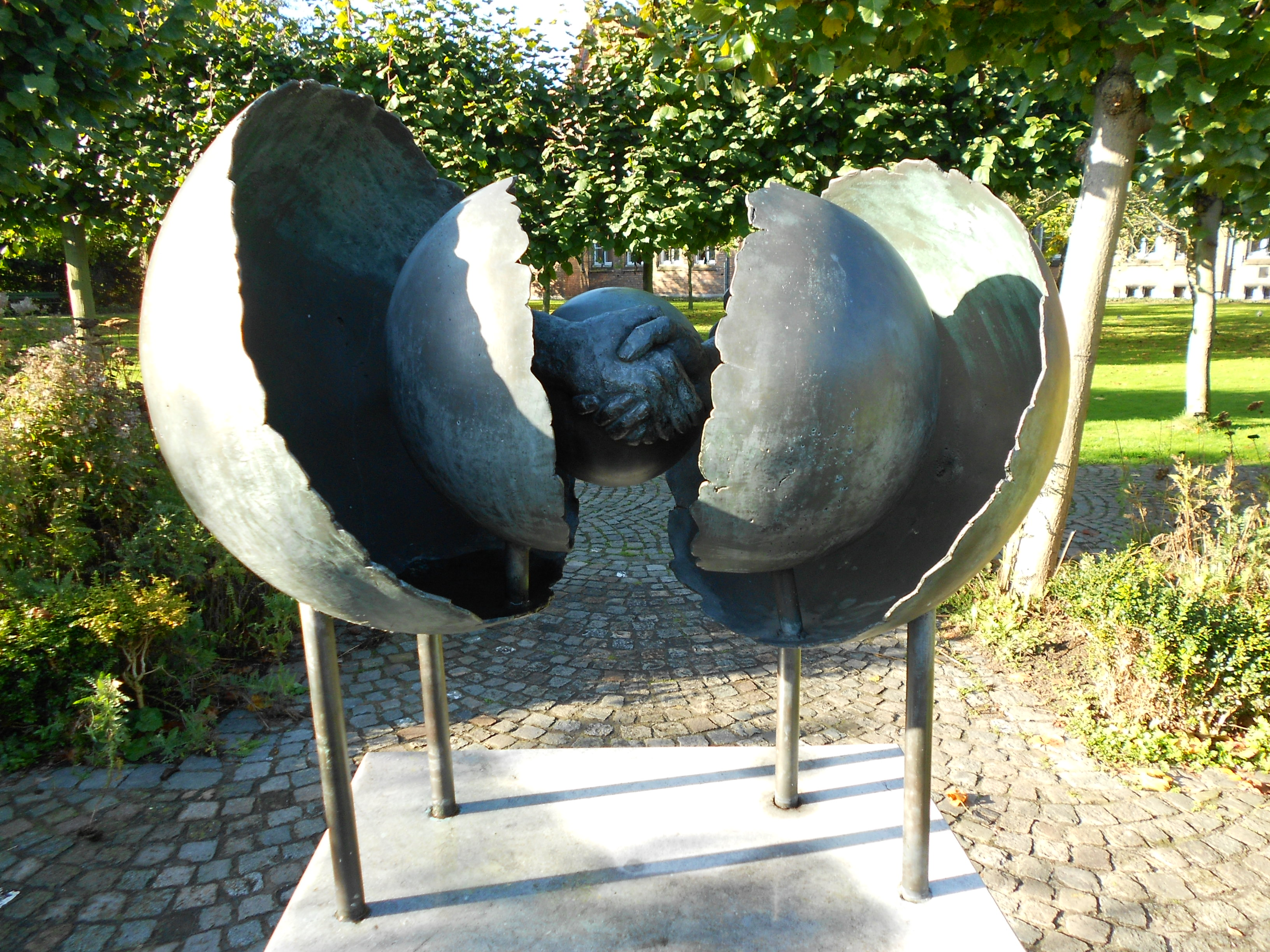 De Nieuwe Wereld, beeld in Brugge. Artist: Leona Sels